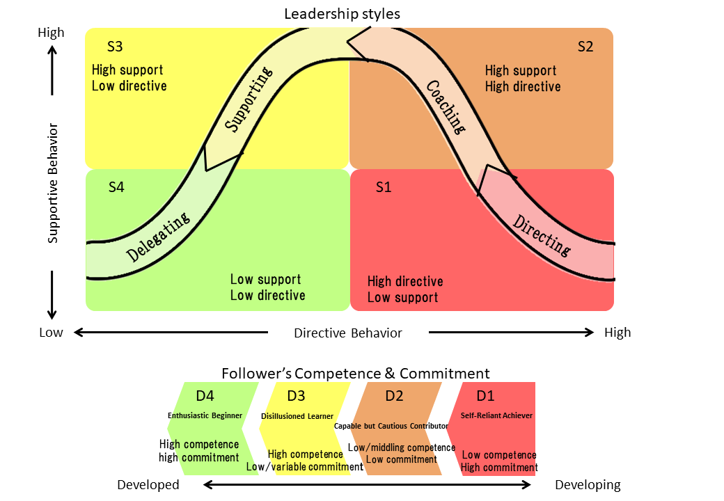 リーダーシップスタイル理論